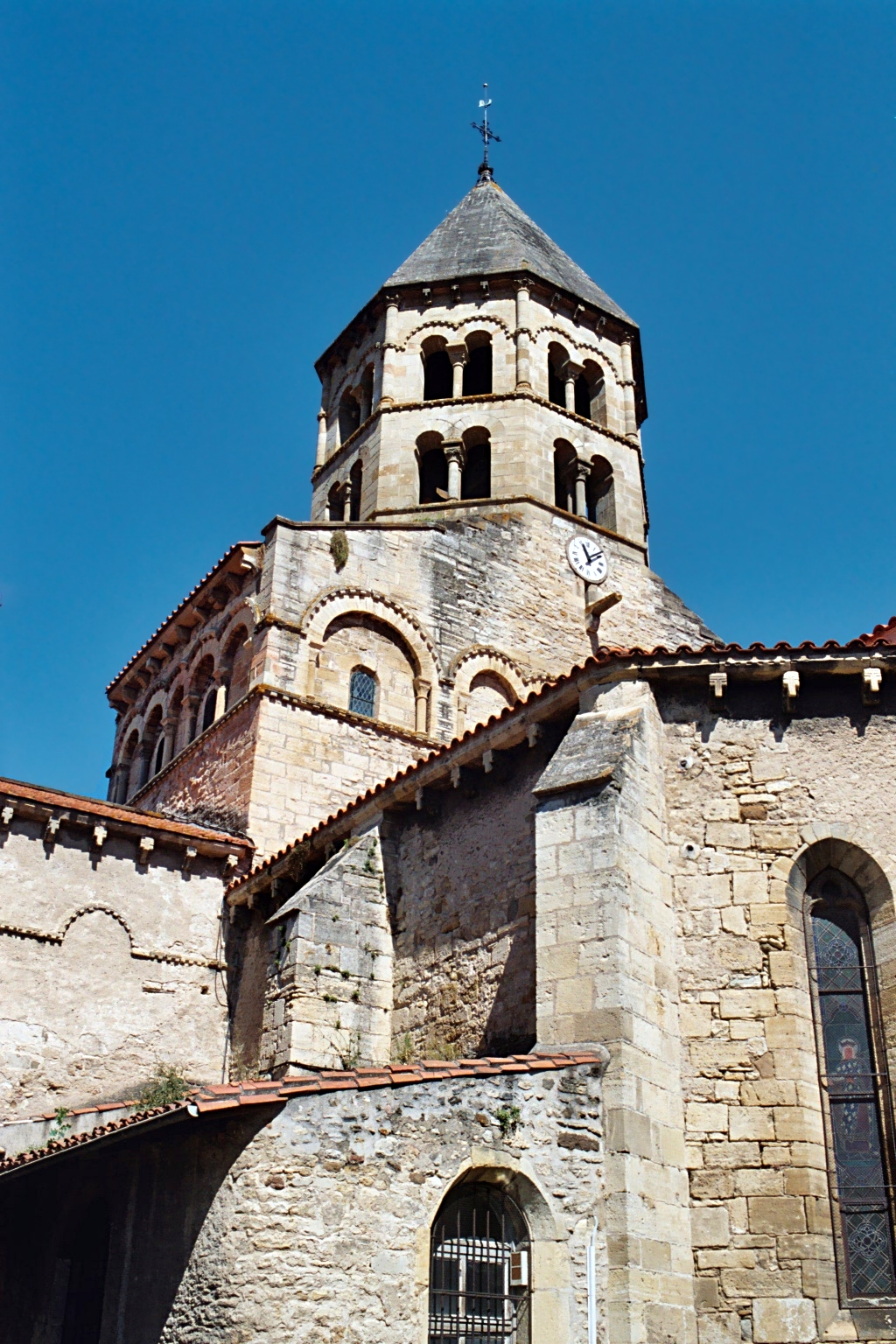 France - Auvergne - Église Saint-Julien de Chauriat